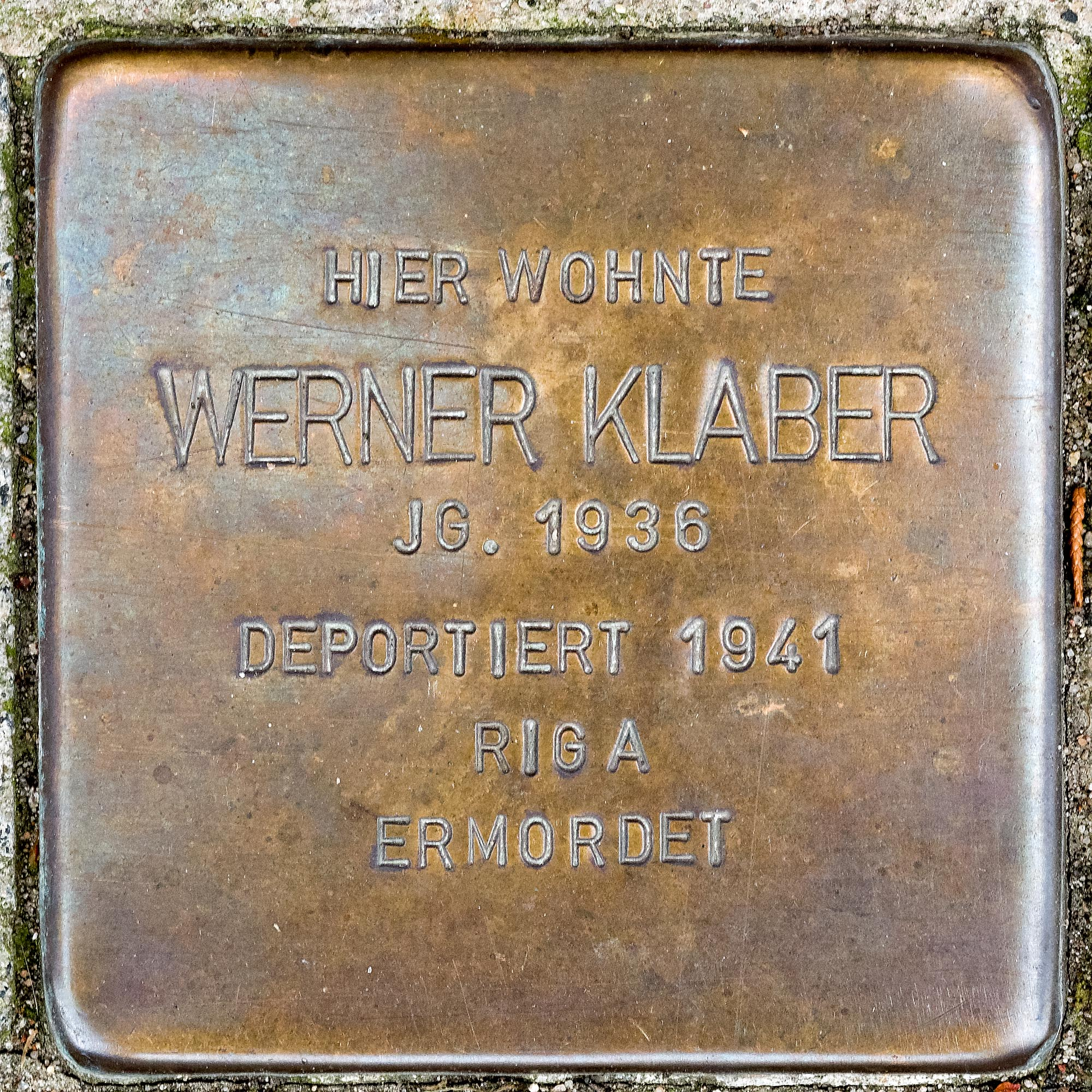 Stolperstein Klaber, Werner